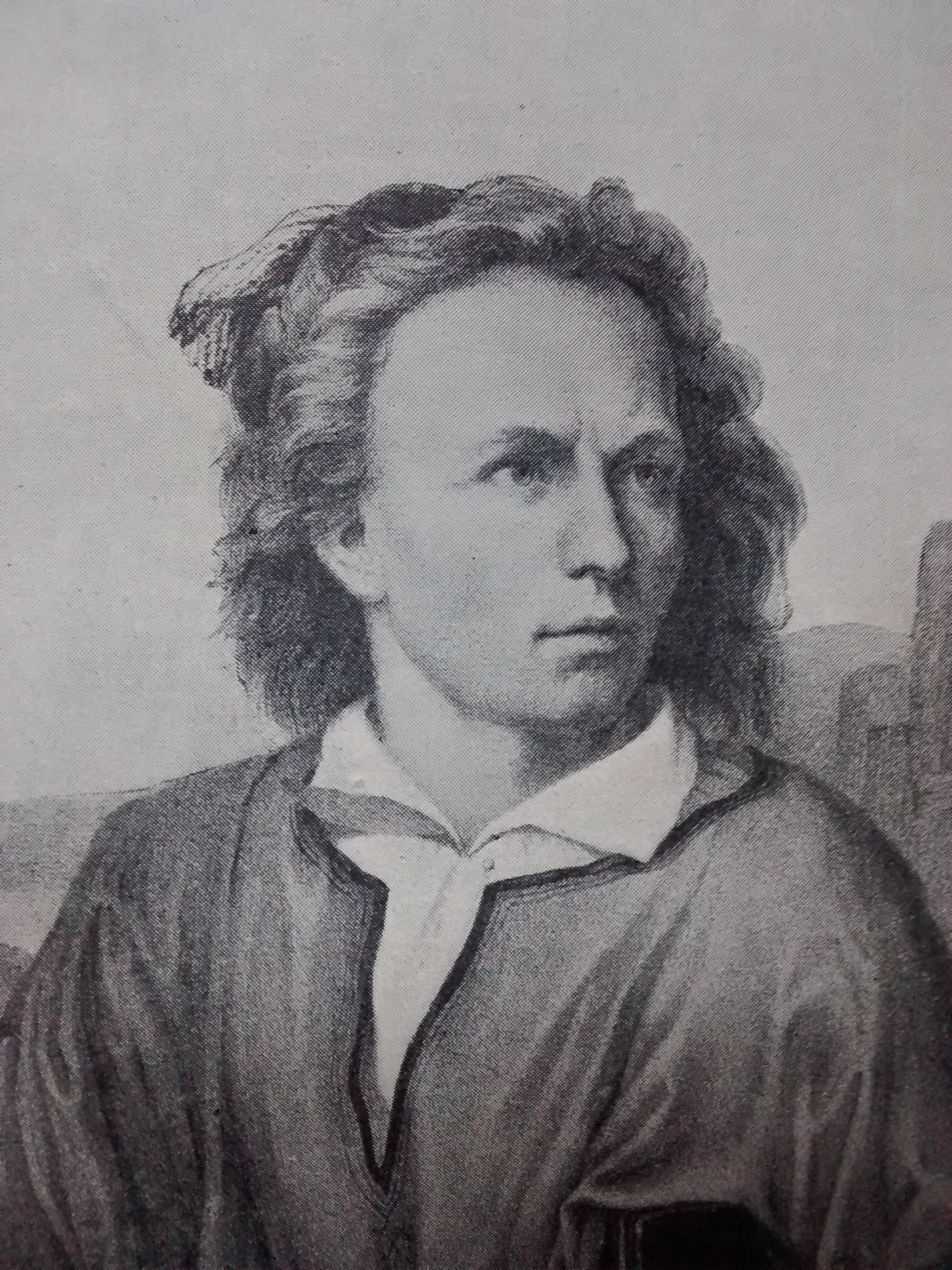 Wilhelm Stier (1797 - 1856), nach einer Bleistiftzeichnung von Ney (ca. 1825)